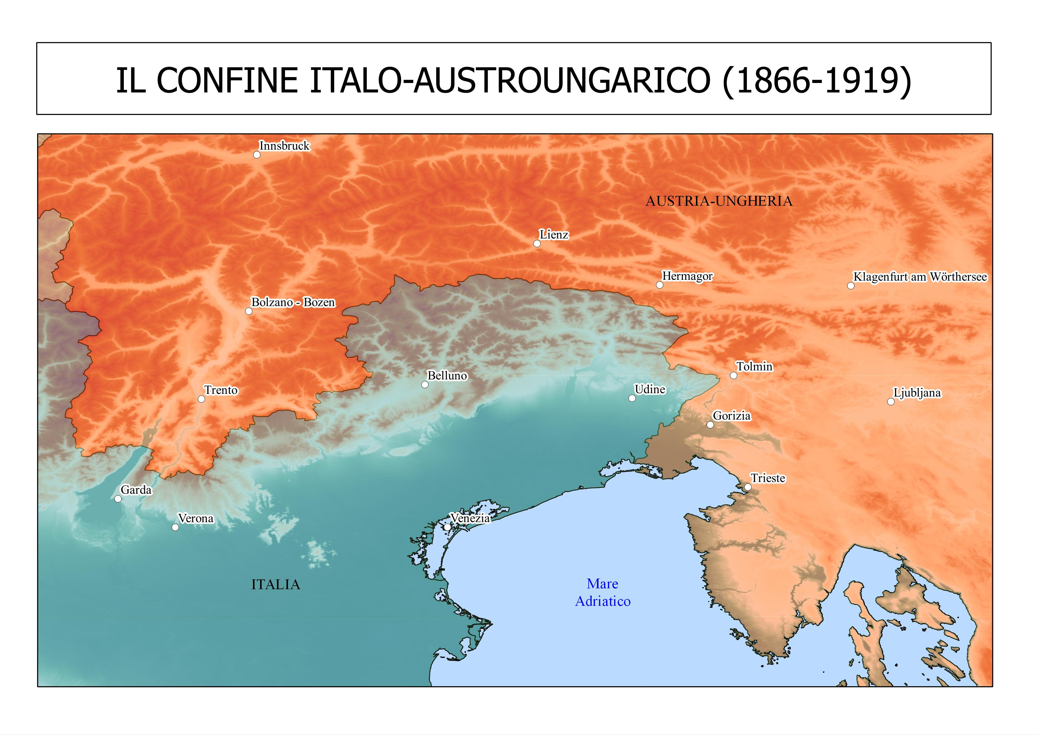 Il confine italo-austroungarico secondo i trattati del 1866. Tale configurazione duro' fino alla Grande Guerra